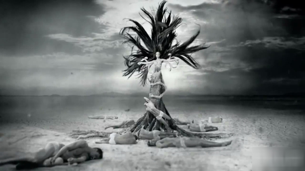 Анна Плетнёва в кадре из клипа Деревья группы Винтаж